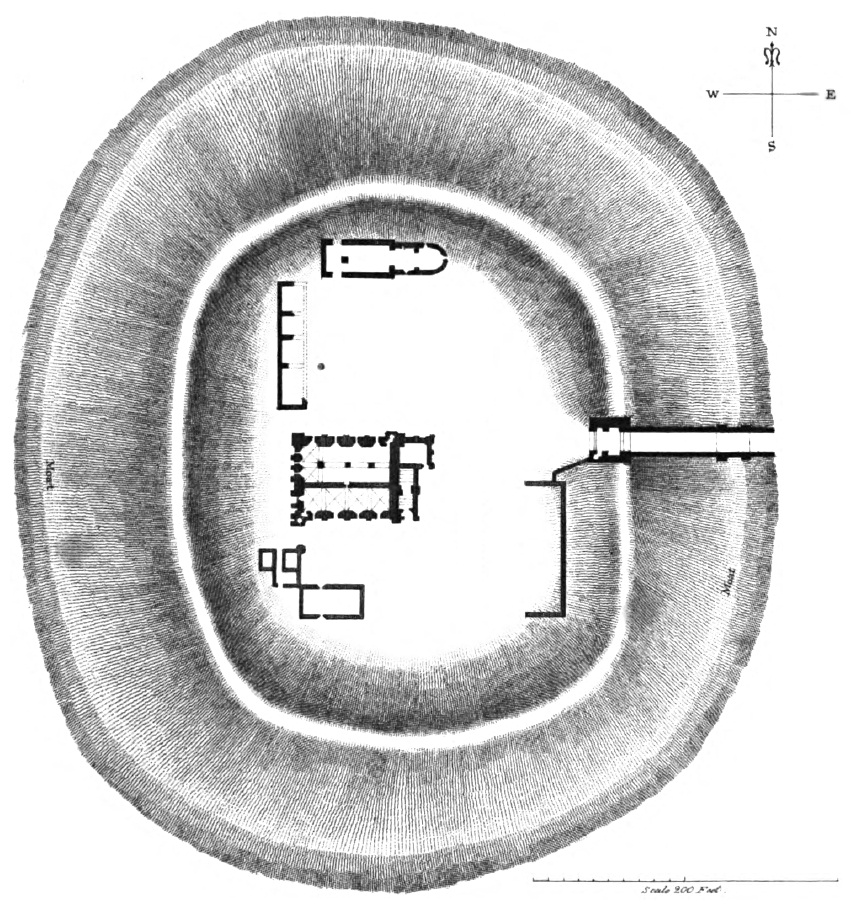 Castle Rising Castle in Norfolk, Lageplan